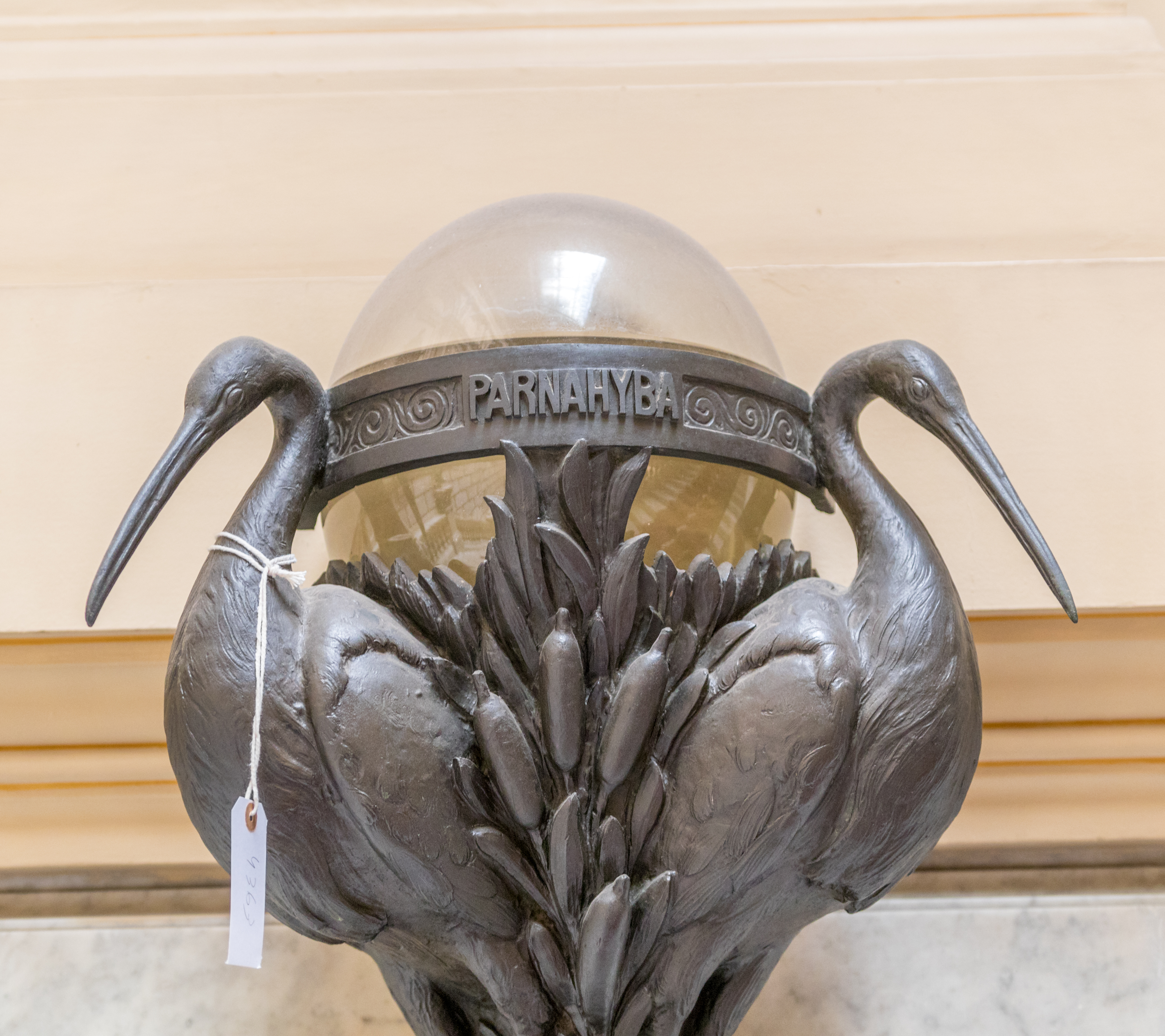 Museu Paulista em reforma